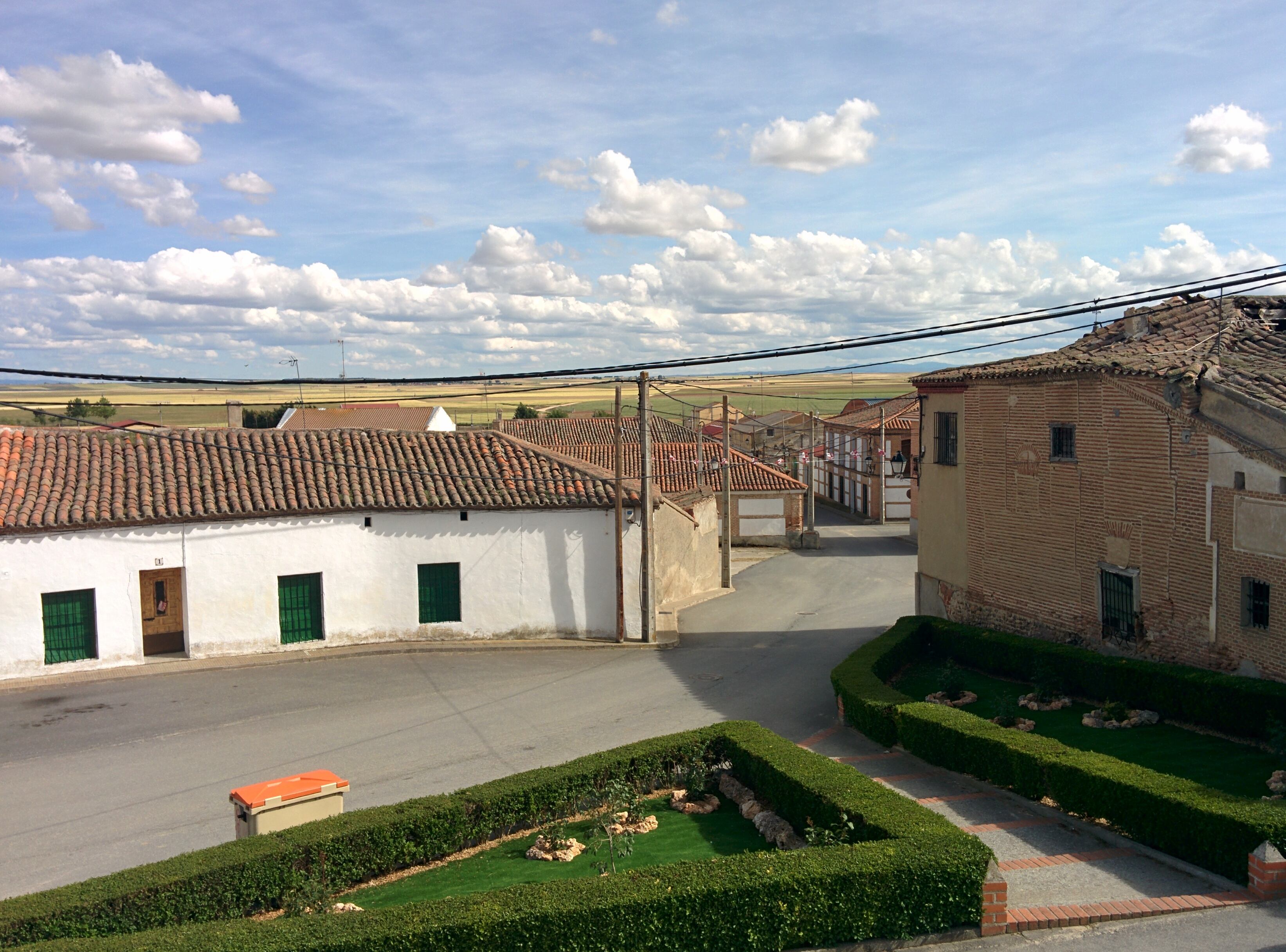 Plaza Mayor de Barromán (Ávila, España).